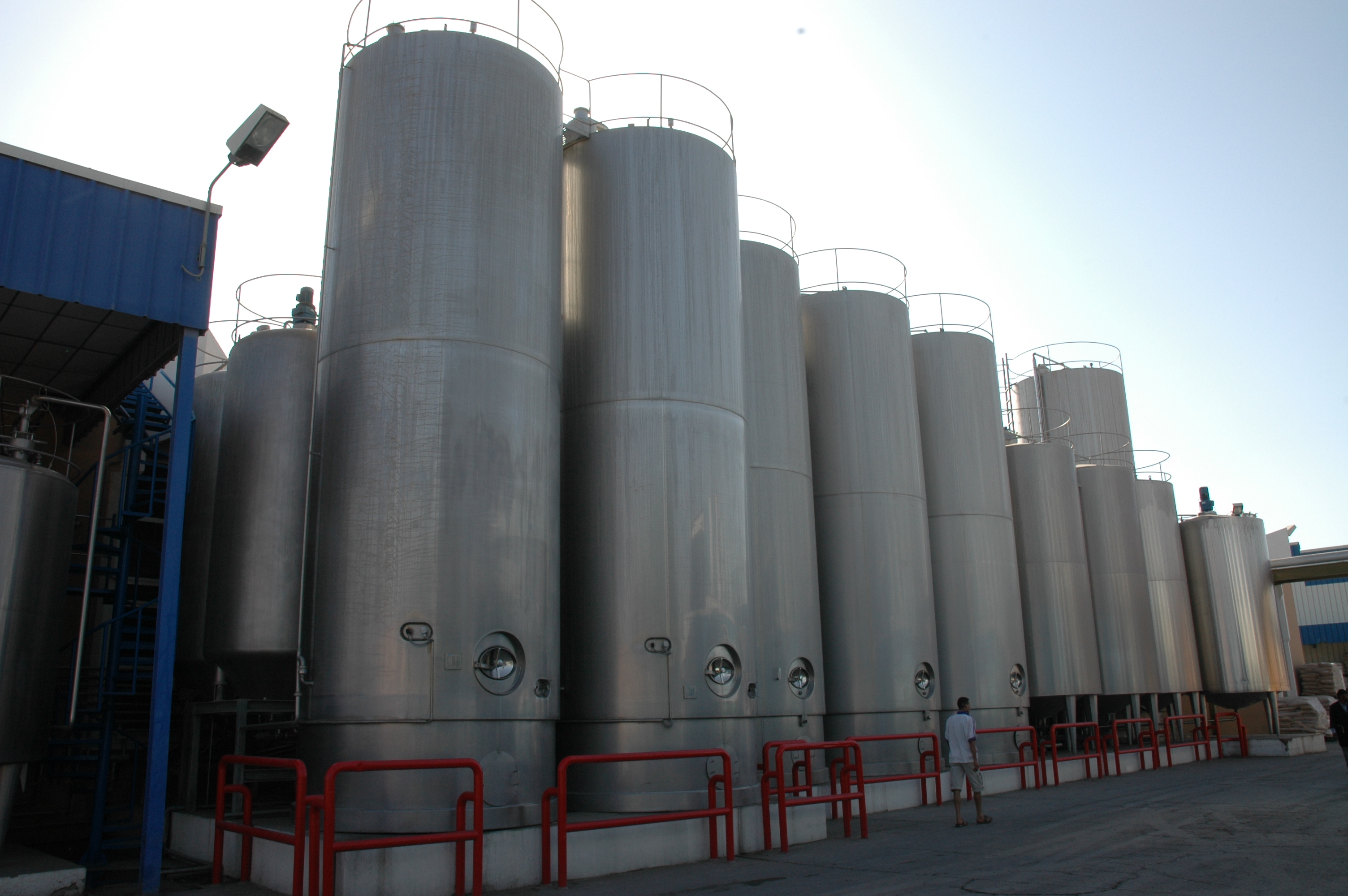 Stockage du lait et du jus de fruit